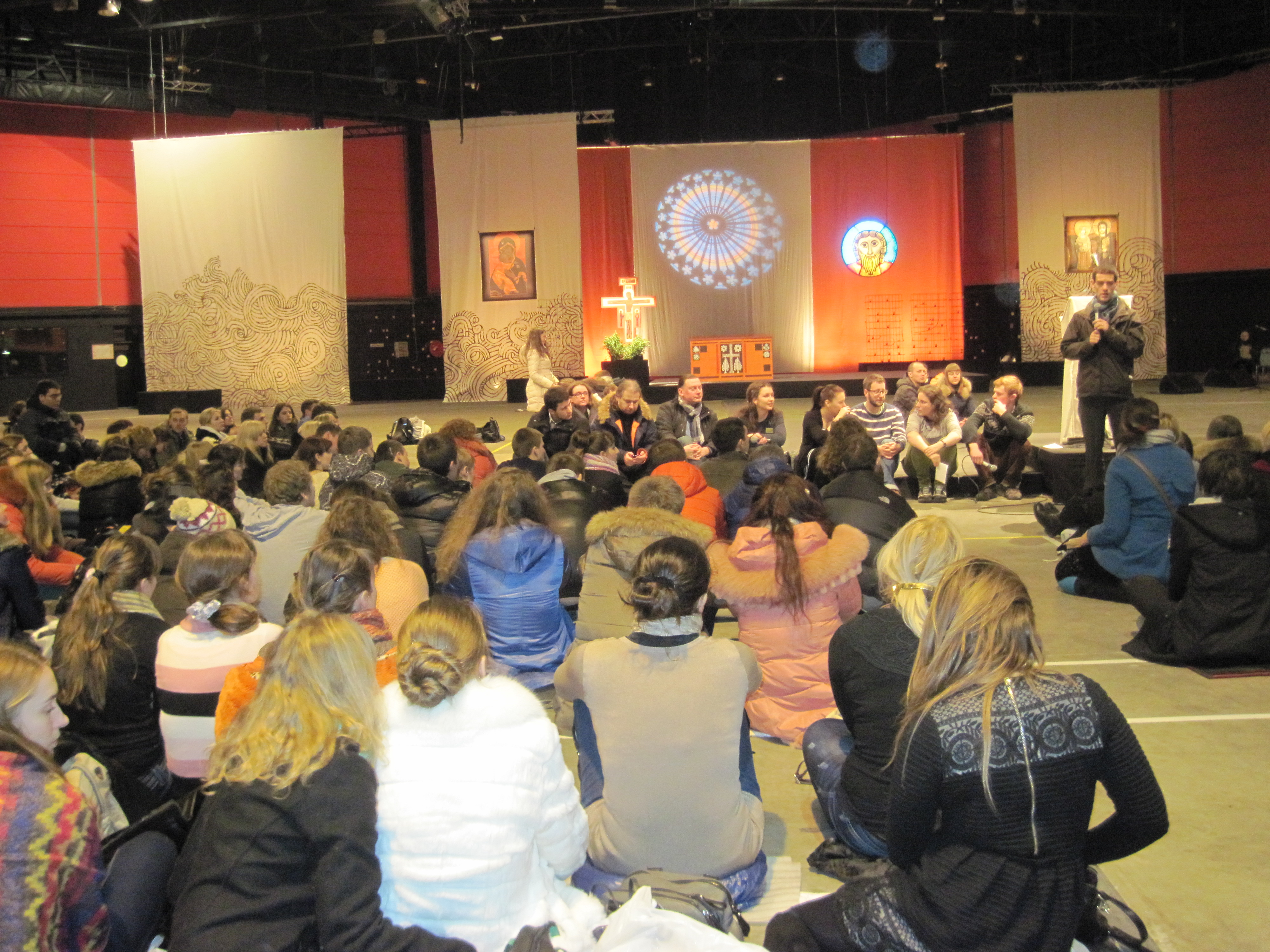 Беларуская (тарашкевіца): Адзін з Братоў Тэзэ вітае беларускіх паломнікаў (Страсбург, Выставачны комплекс Вакен, 31 сьнежня 2013)